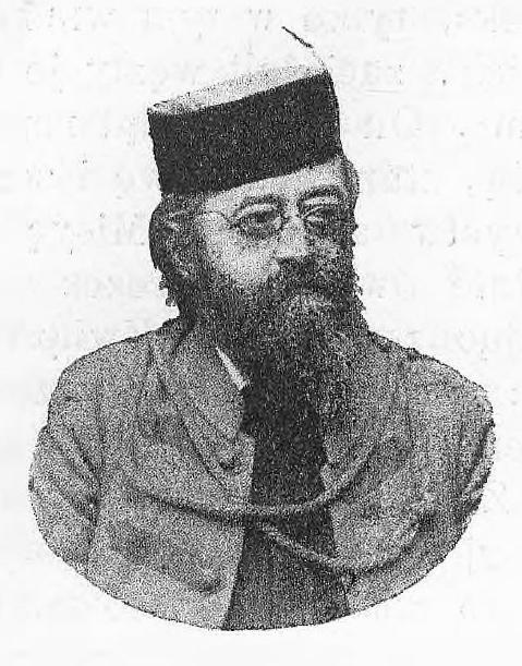 Tadeusz Romanowicz